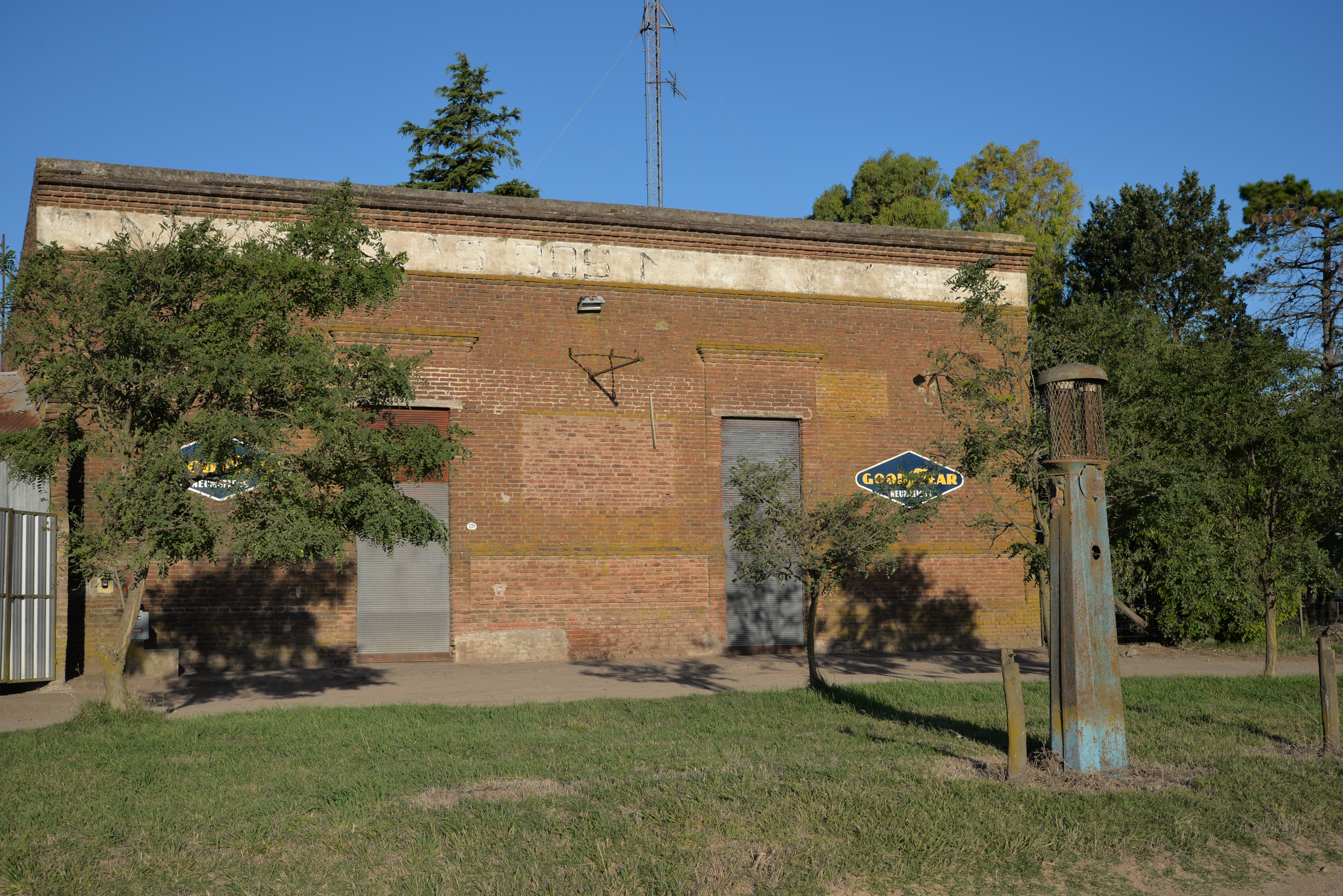 Almacén de Ramos Generales DOS NACIONES